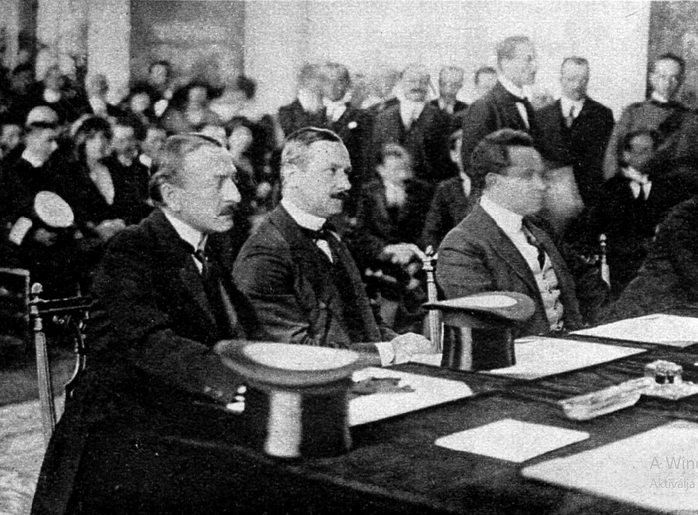 Drasche-Lázár és Benárd a két magyar aláíró a trianoni asztalnál